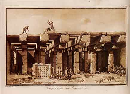 Jean Hoüel, Veduta interna di una cisterna a San Basilio,vicino Lentini,1777. (Guazzo)